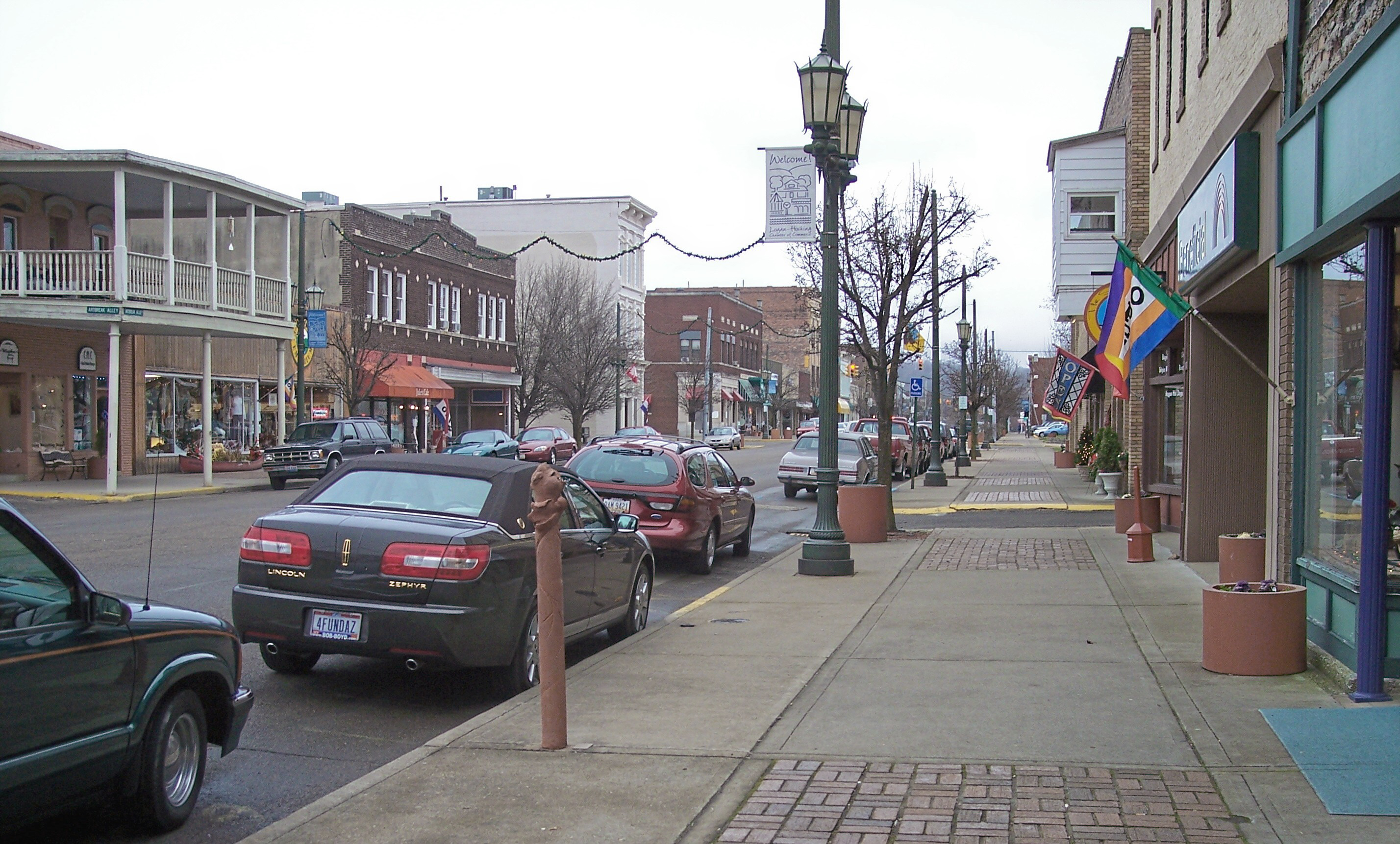 West Main Street in Logan, Ohio